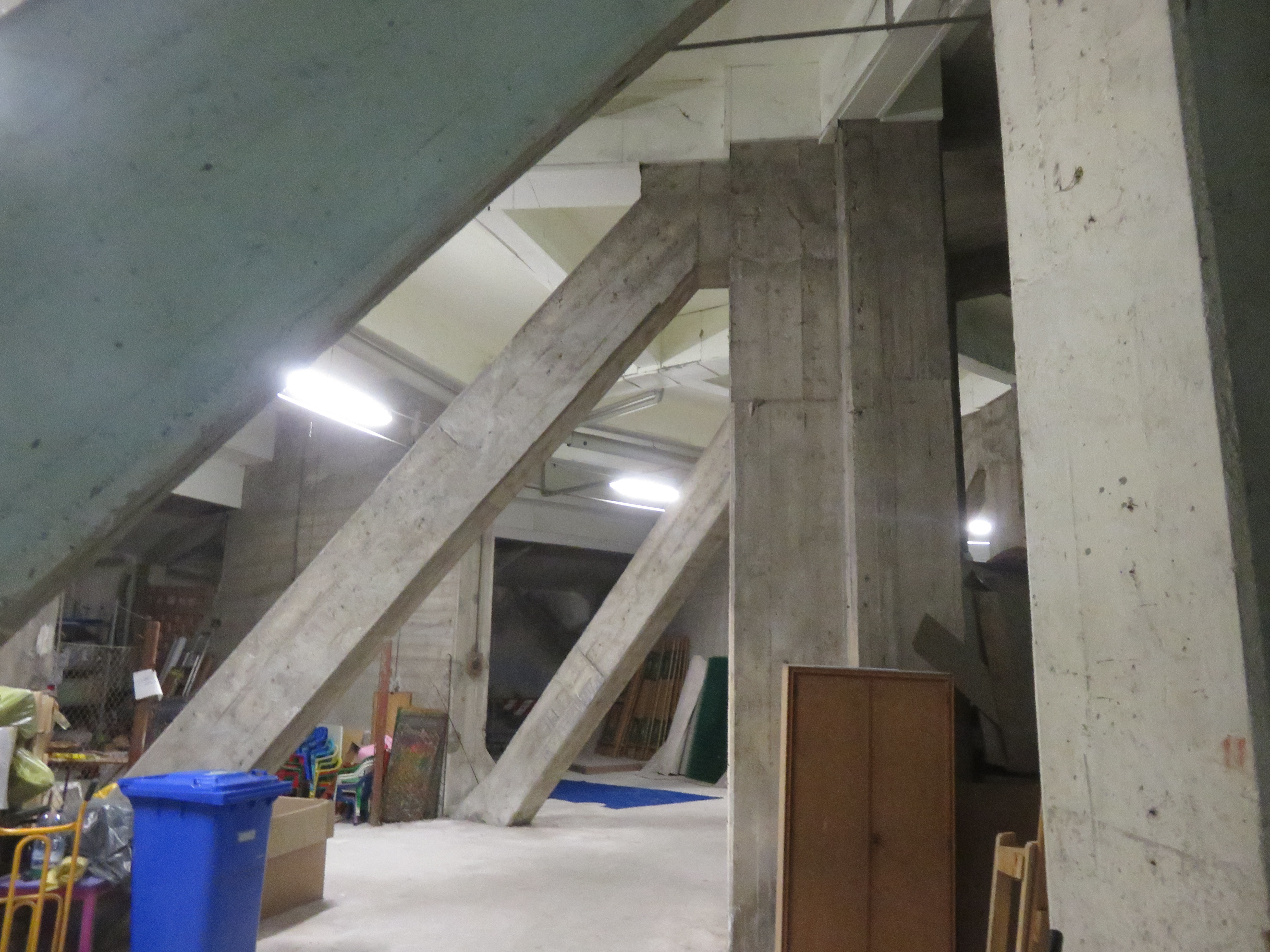 Struttura interna del serbatoio con travi in cemento armato e spazi usati come deposito